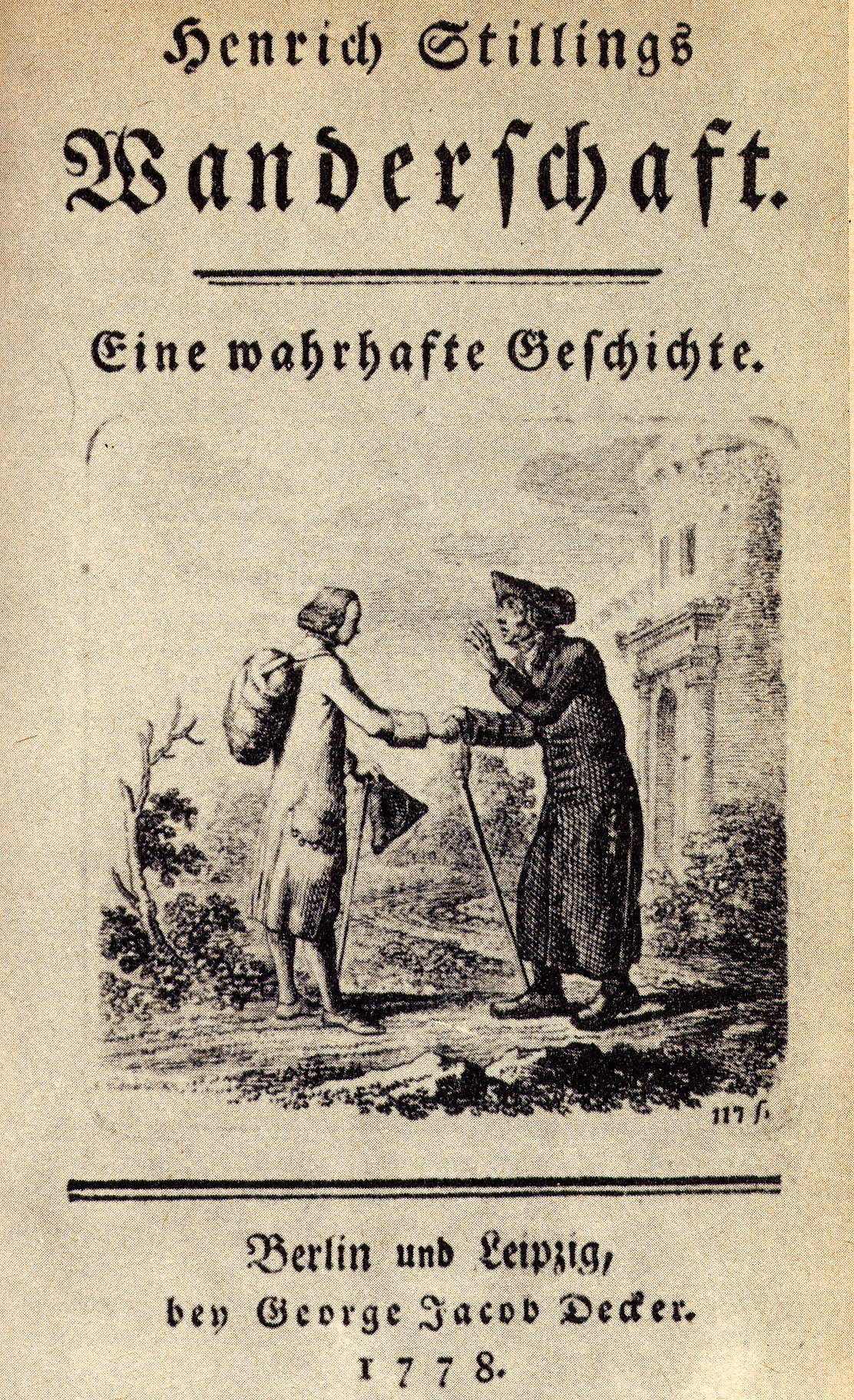 Titelbild der Originalausgabe von Henrich Stillings Wanderschaft. Eine wahrhafte Geschichte. Berlin und Leipzig bey George Jacob Decker 1778